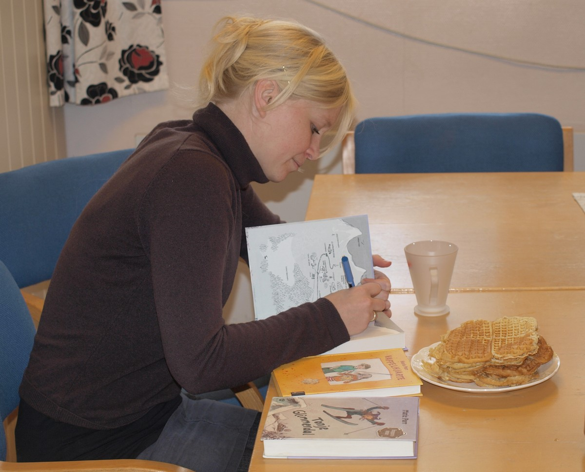 Maria Parr signerer bøker ho har skreve, og et vaffelhjarte